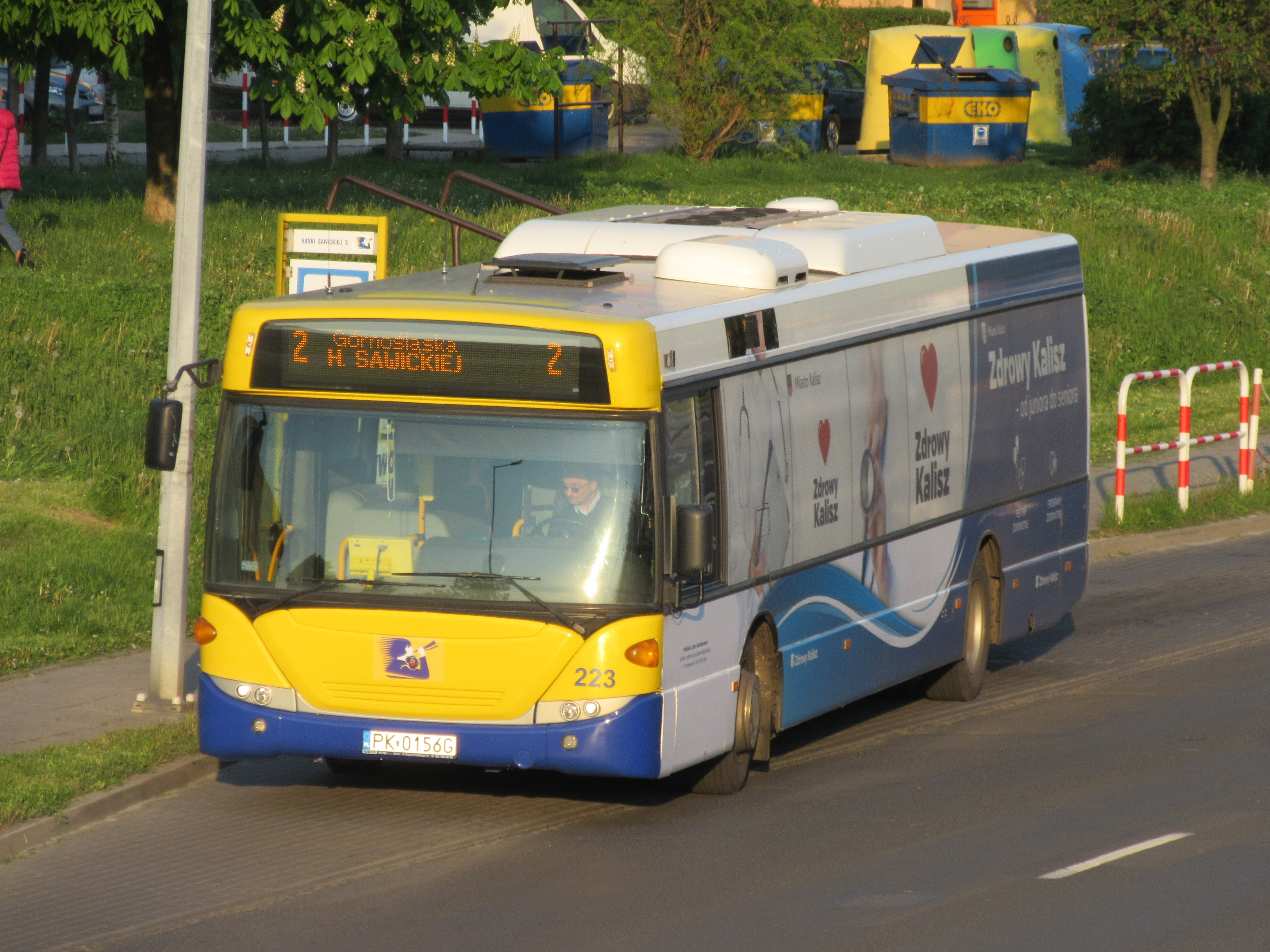 Scania OmniCity (CN270UB) Kaliskich Linii Autobusowych na przystanku Sawickiej Arena (ob. Wyszyńskiego Arena) w Kaliszu